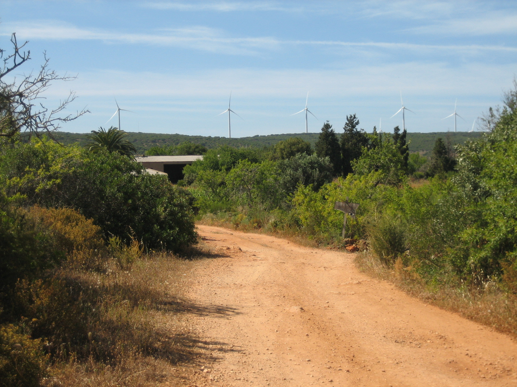 Windmills. Barão de São Miguel